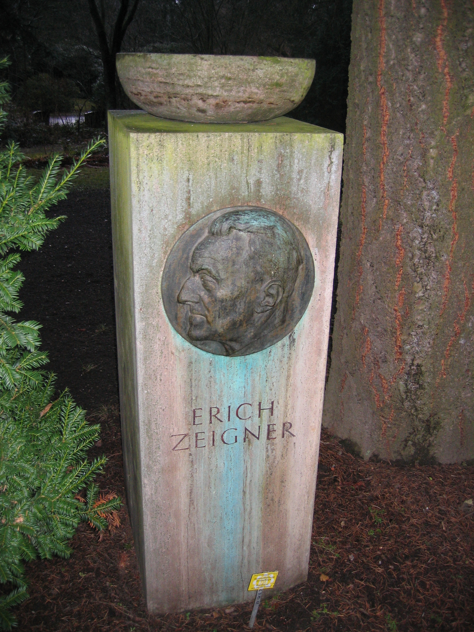 Das Grab von Erich Zeigner auf dem Leipziger Südfriedhof